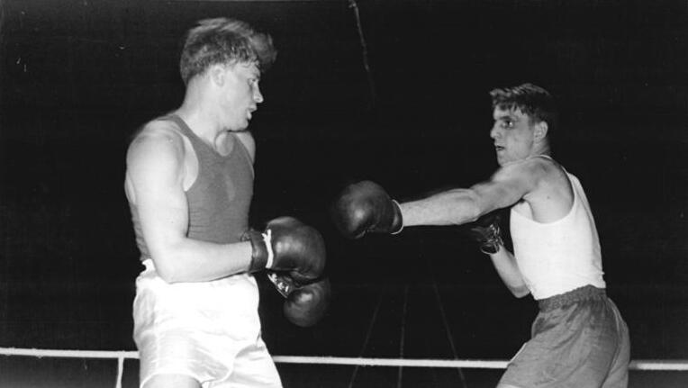 Tschatkow, Zbigniew Piórkowski Zentralbild III 15 Motive 2.10.1954 Internationales Boxturnier im Wassil-Lewski-Stadion in Sofia im September 1954 (Bulgarien) Das grosse internationale Länderturnier im Boxen wurde am 22. September abgeschlossen. Die polnische Staffel belegte mit 10:0 Punkten den ersten Platz. An zweiter Stelle steht die Sowjetunion, gefolgt von Bulgarien, Ungarn, der Tschechoslowakische Republik und der Mannschaft der Deutschen Demokratischen Republik. UBz: Boxkampf zwischen Tschatkow (UdSSR) und Piorkowski (CSR), Halbschwergewicht.